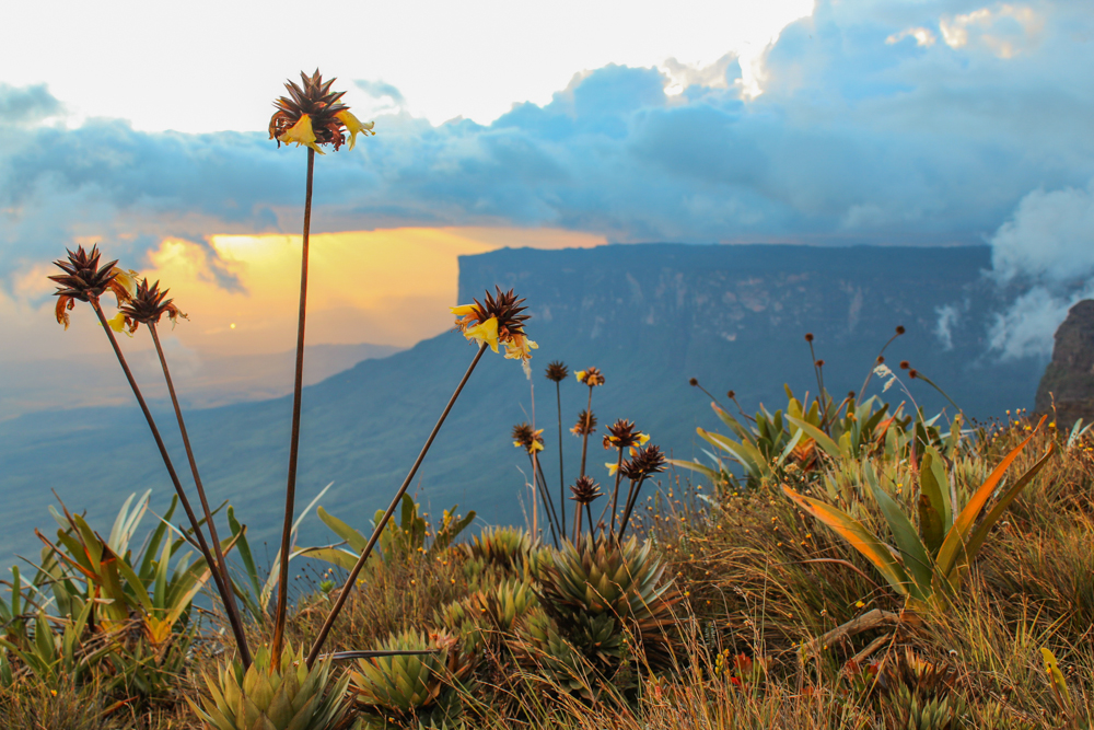 Pôr do sol visto do Maverick, no topo do Monte Roraima